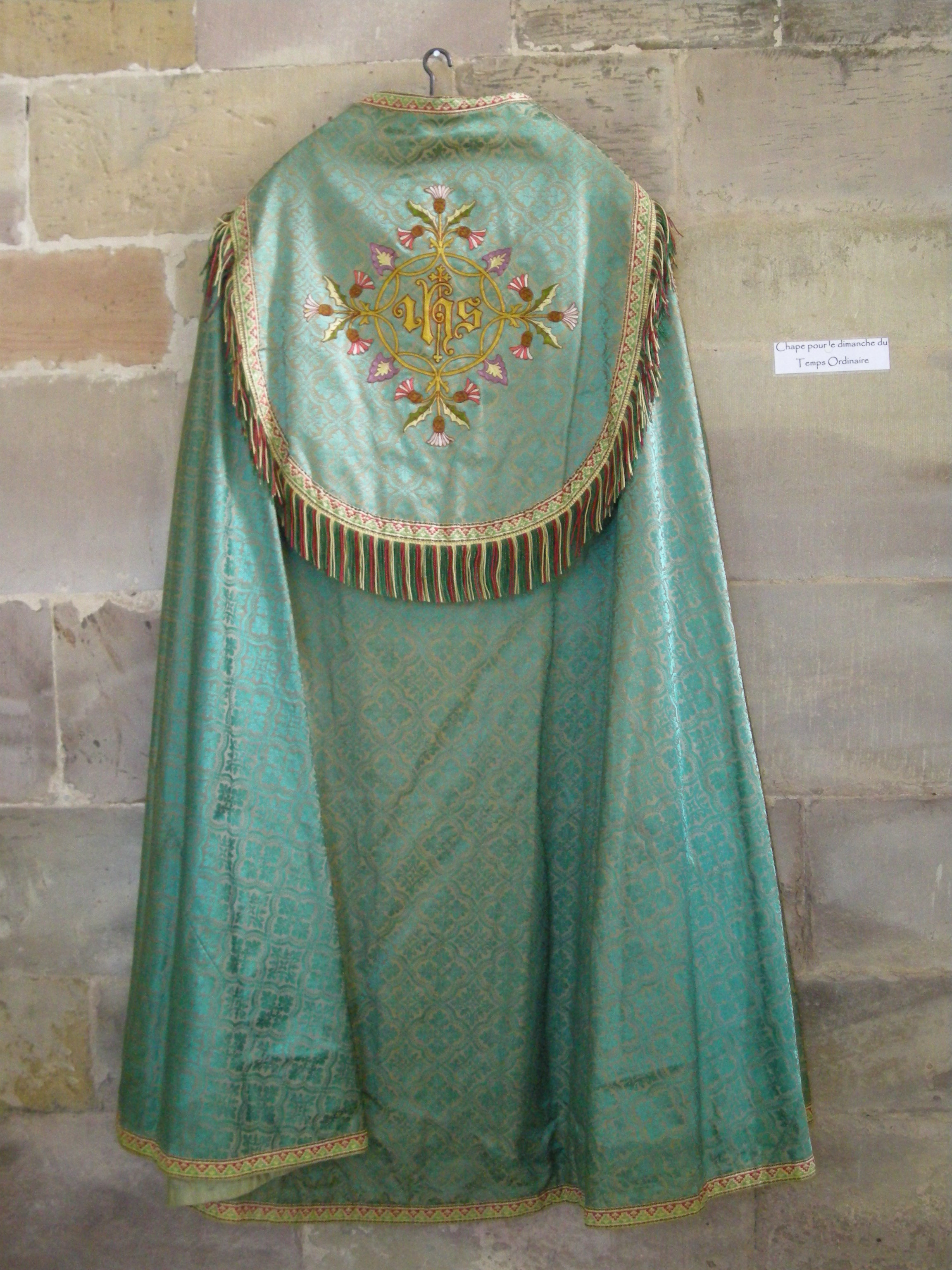 Chape pour le dimanche du Temps Ordinaire, présentée dans le cadre d'une exposition temporaire à l'abbaye Notre-Dame d'Autrey (Vosges) en 2008.